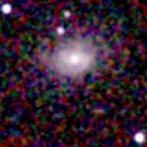 Galaxy NGC 26